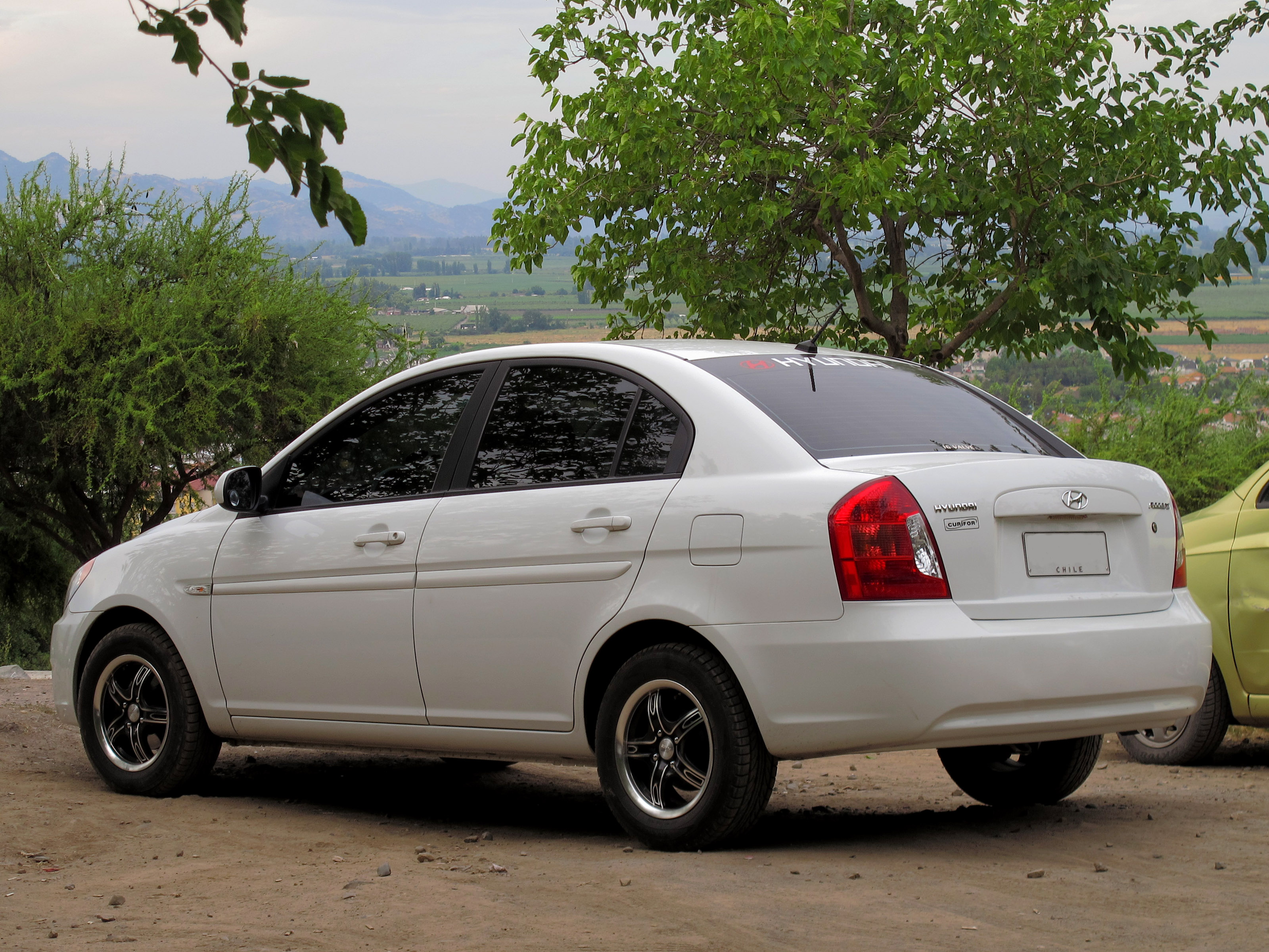 Hyundai Accent GL 1.4 2010